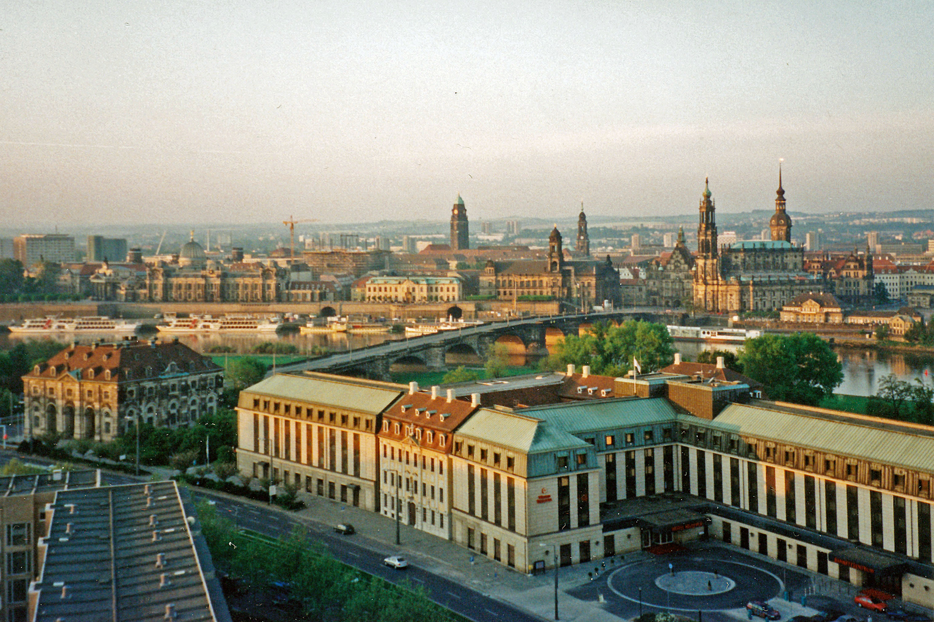 Ballonfahrt über Dresden im Mai 2000 - über der Neustadt (Scan vom Analogbild)